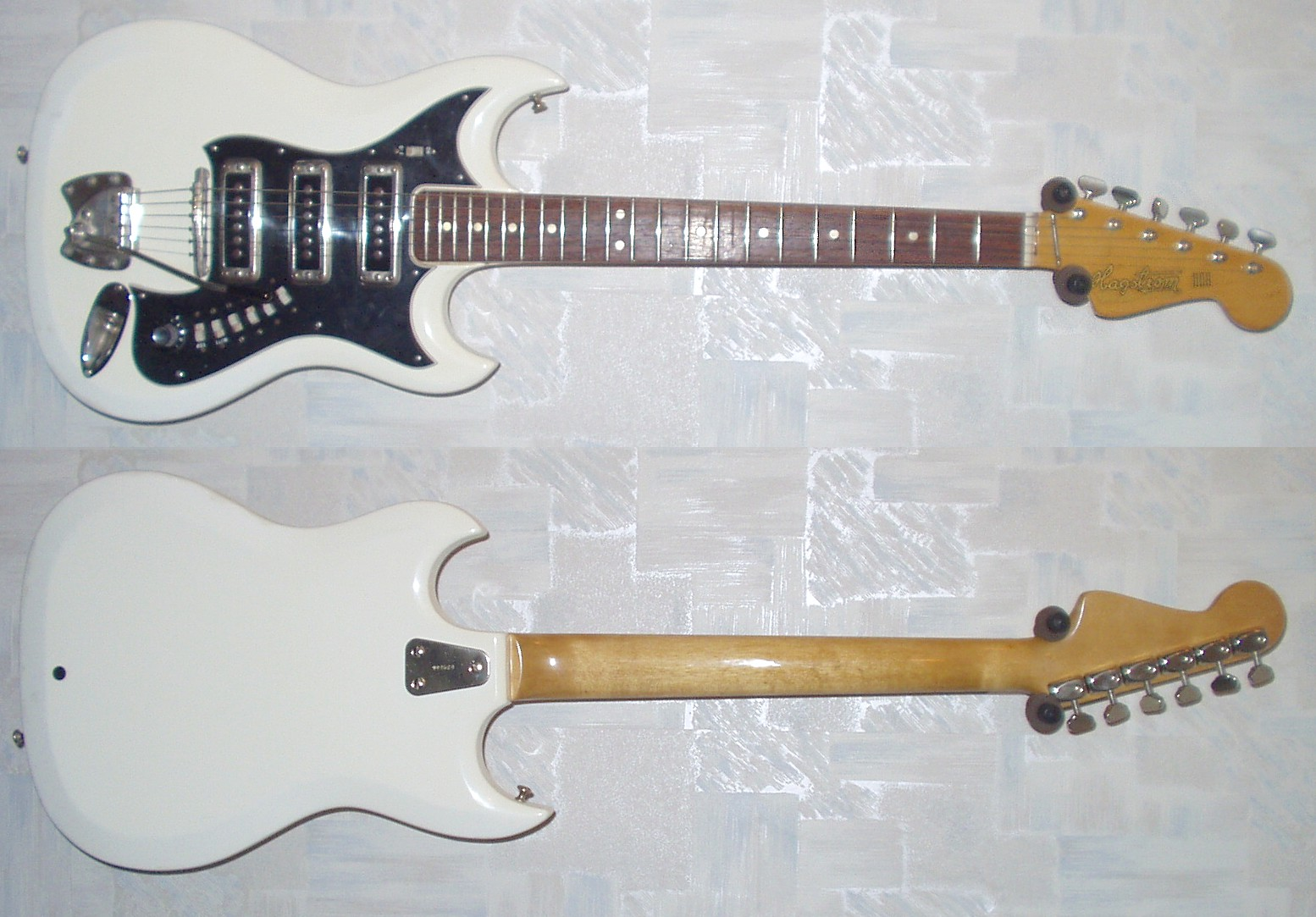 Hagström III, Baujahr ca. Ende der 1960er Jahre